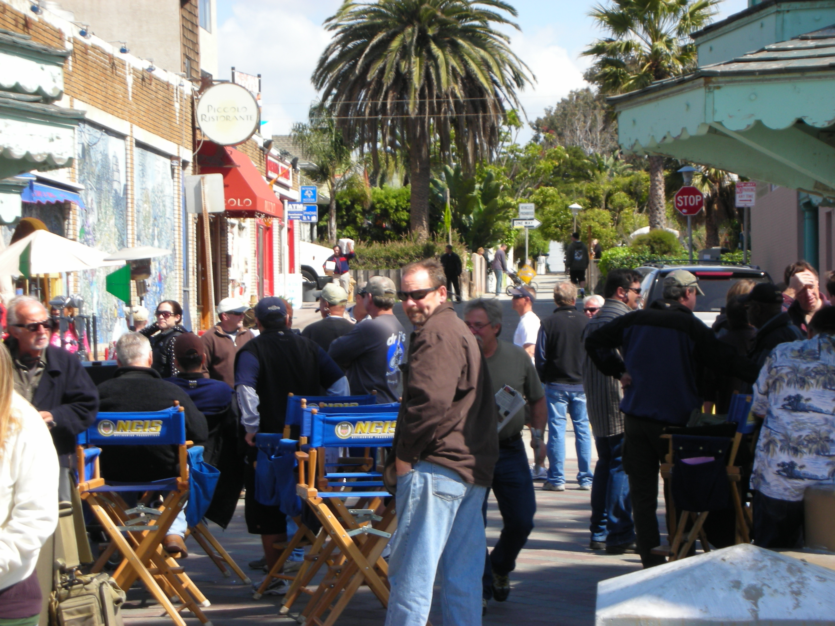 NCIS Filming